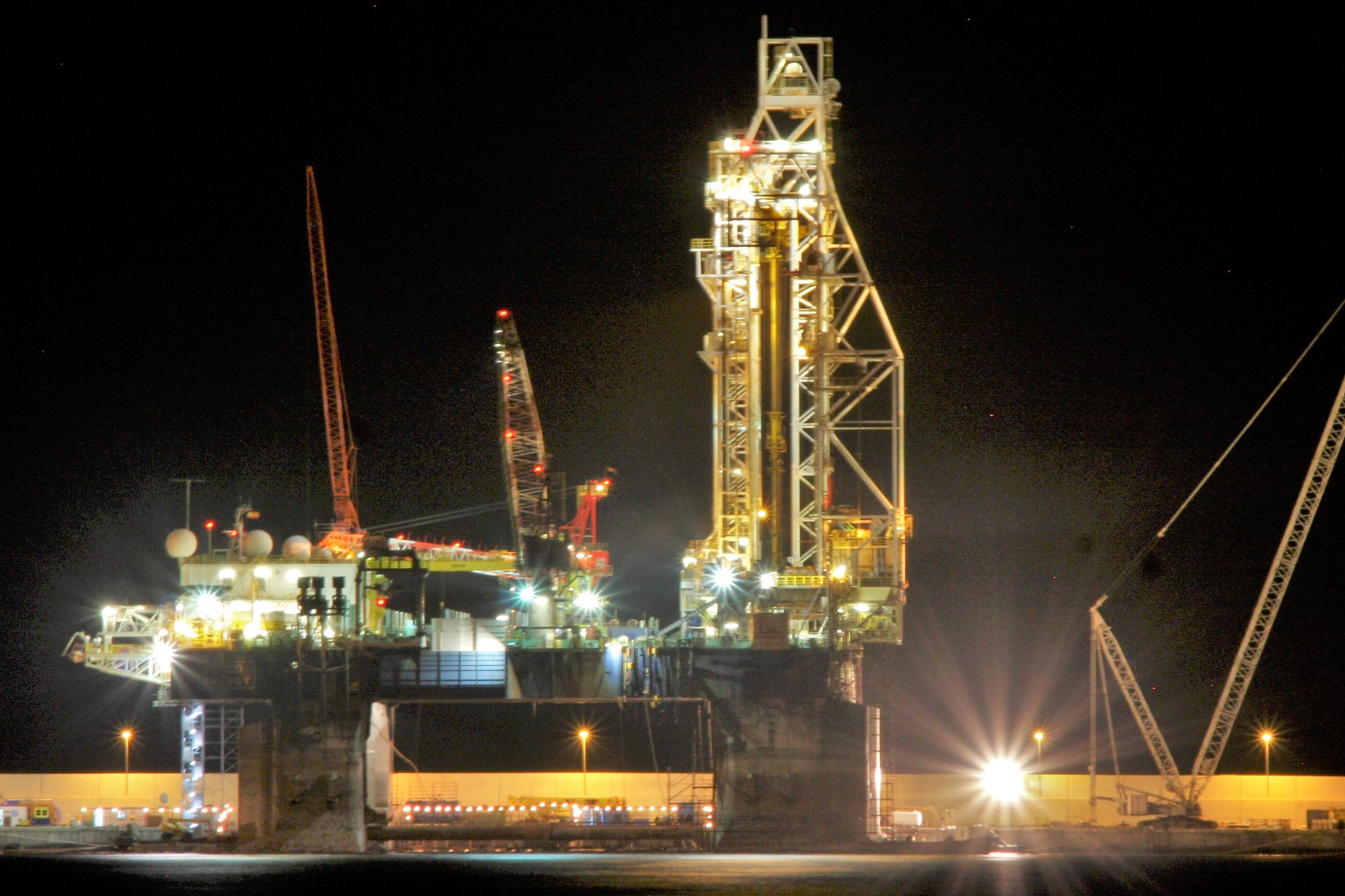 Las plataformas petrolíferas Sedco Energy y la Cosl Pioneer en el muelle Reina Sofía del Puerto de la Luz y de Las Palmas La plataforma petrolífera Sedco Energy, que está sometiéndose a obras de gran calado que se alargarán casi tres meses más, se encuentra a su lado en el muelle Reina Sofía la Cosl Pioneer, en su viaje inaugural desde China antes de partir a su destino de trabajo en Noruega, y cuyos propietarios han alargado unos días más su estancia, por lo cual permanecerán hasta mediados de la próxima semana, si no surgen nuevas variaciones. Y, junto a ellos se unirá una tercera planta de extracción de petróleo, el Corcovado, de la mano también de la consignataria Hamilton. En principio no se ha confirmado su periodo de estancia y si realizará trabajos internos, por lo que de momento solo tiene solicitado permiso para fondear.